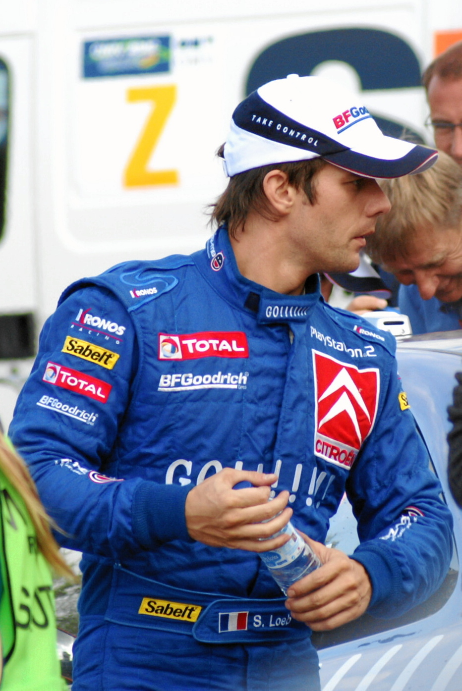 Sébastien Loeb bei der Rallye Deutschland 2006 (Regrouping Ende Tag 2)